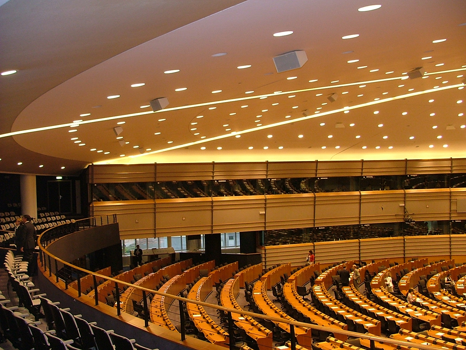 Belgium, Bruxelles - Brussel, European Parliament Pl: Belgia, Bruksela, Parlament Europejski